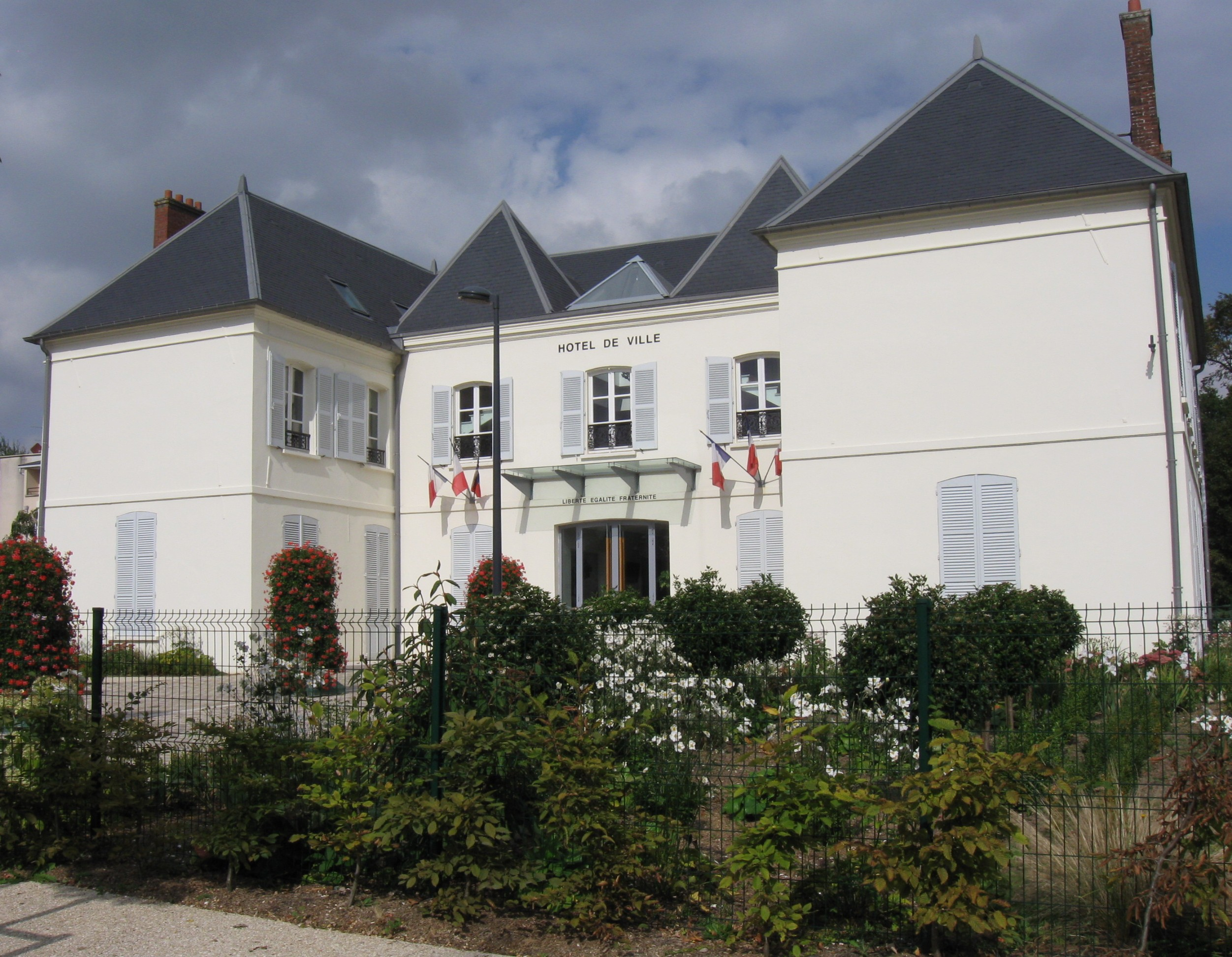 Mairie de Villenoy. (Seine-et-Marne, région Île-de-France).